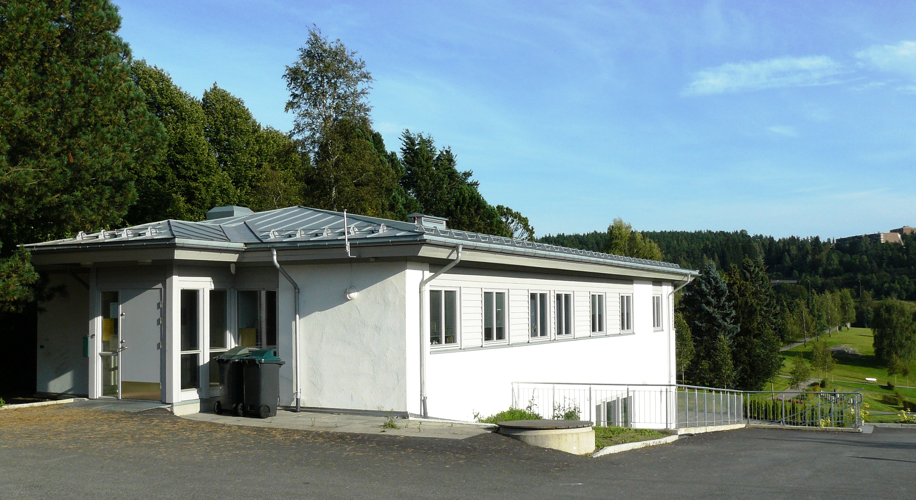 Høybråten parish house, Oslo